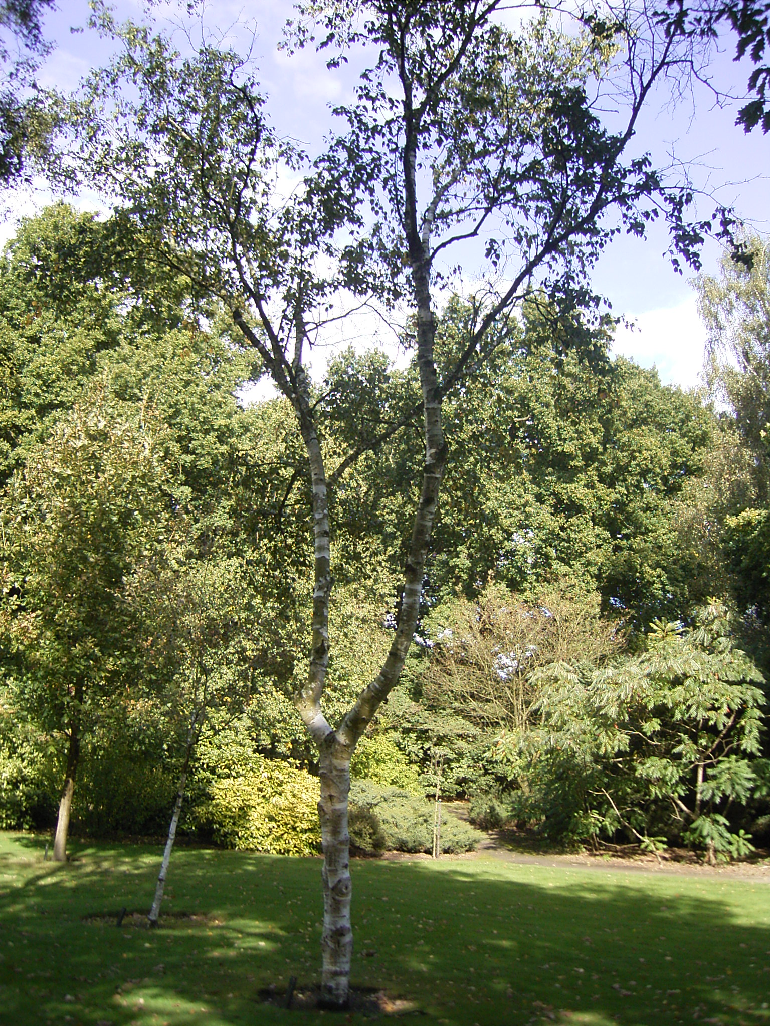 Deze foto toont de Chinese berk. Ik nam de foto op zaterdag 1 oktober in het arboretum in Wageningen. This pic shows Betula albosinensis. I took the photo in Wageningen, Netherlands.